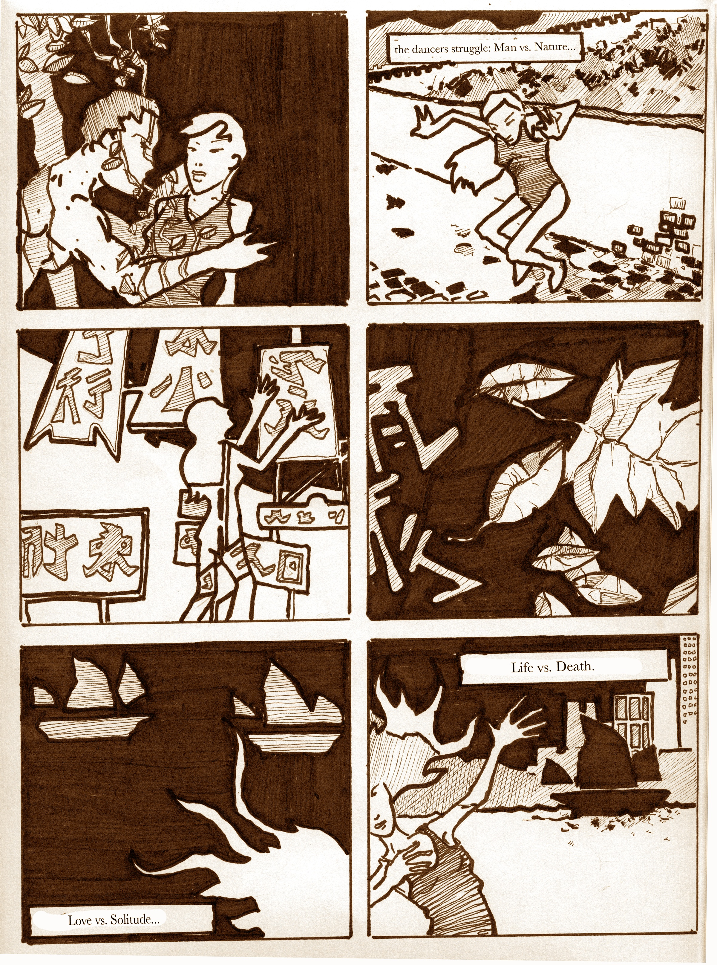 bravo panel 3 colour/storyboard Bone (2005 film)